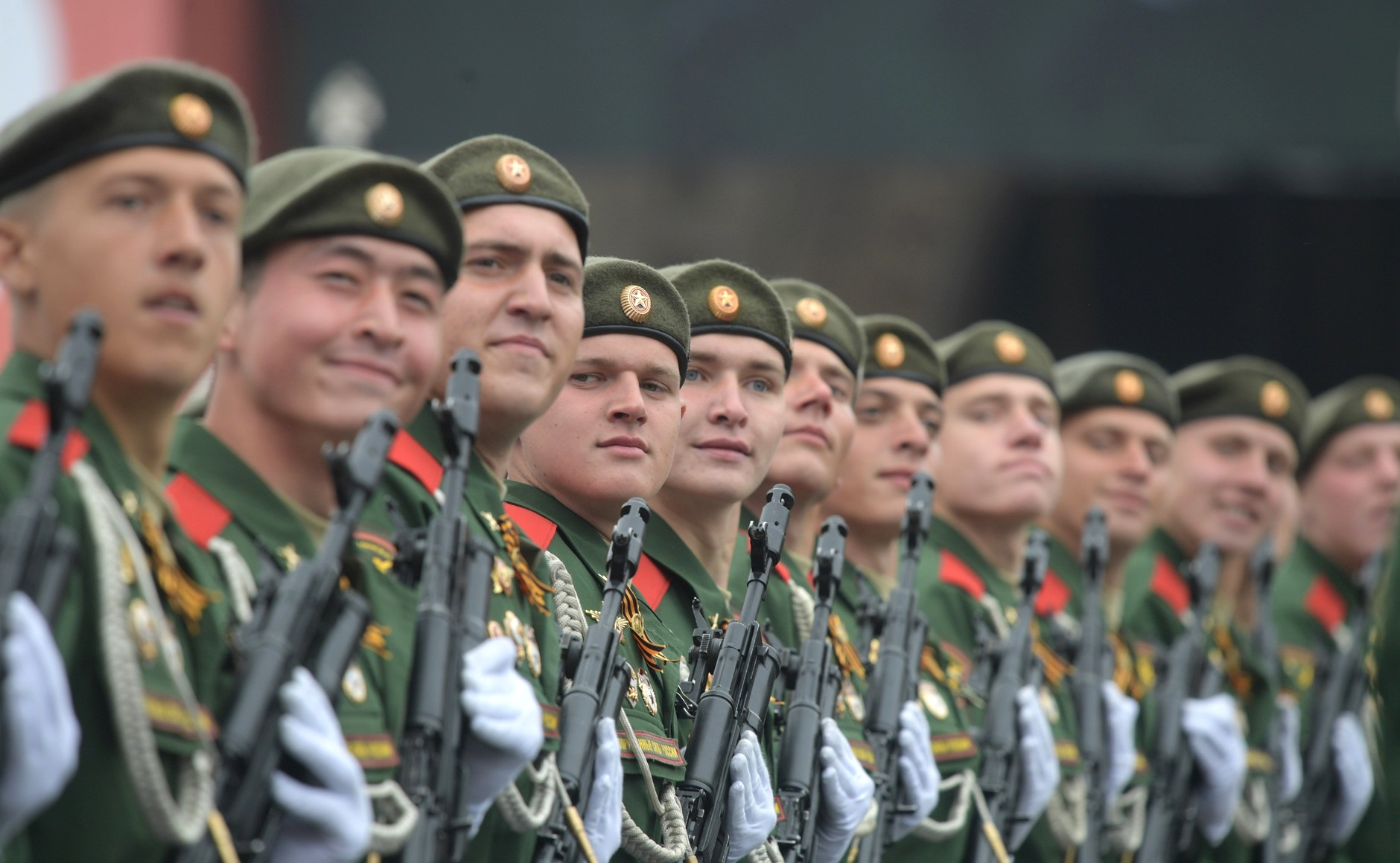 Военный парад на Красной площади в ознаменование 74-й годовщины Победы в Великой Отечественной войне 1941–1945 годов